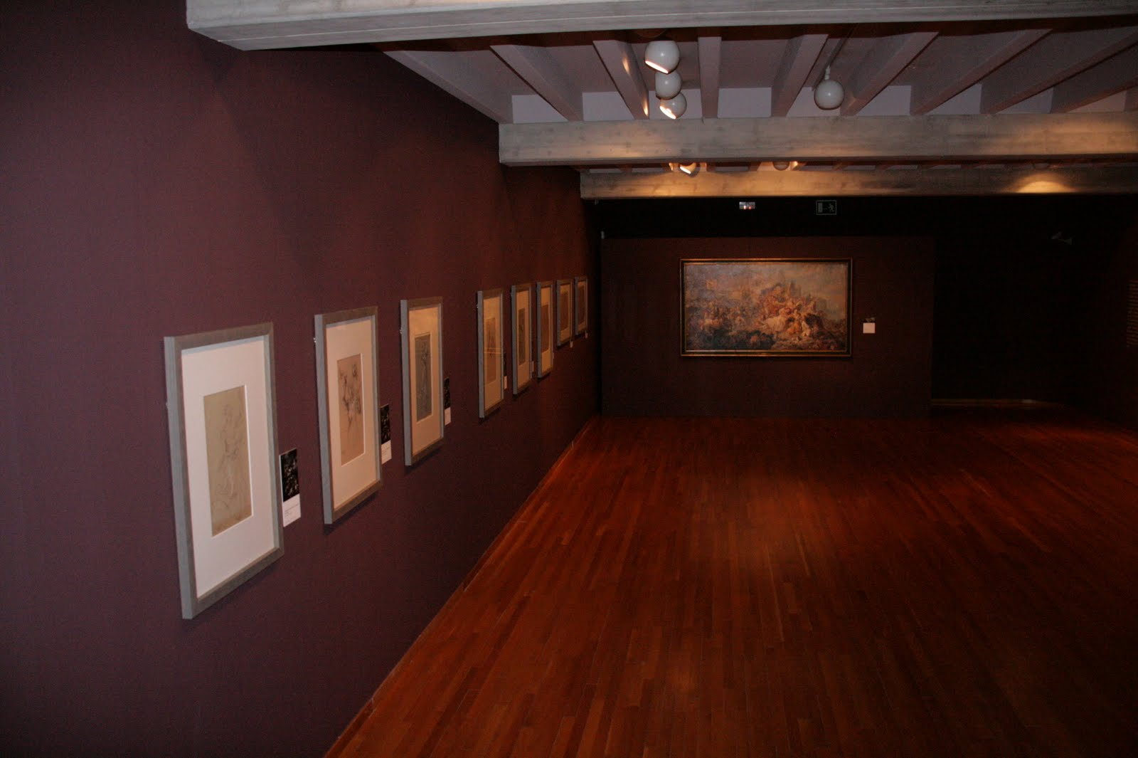 Exposició Anatomia d'un quadre, al voltant de l'obra El Gran dia de Girona al Museu d'Art de Girona